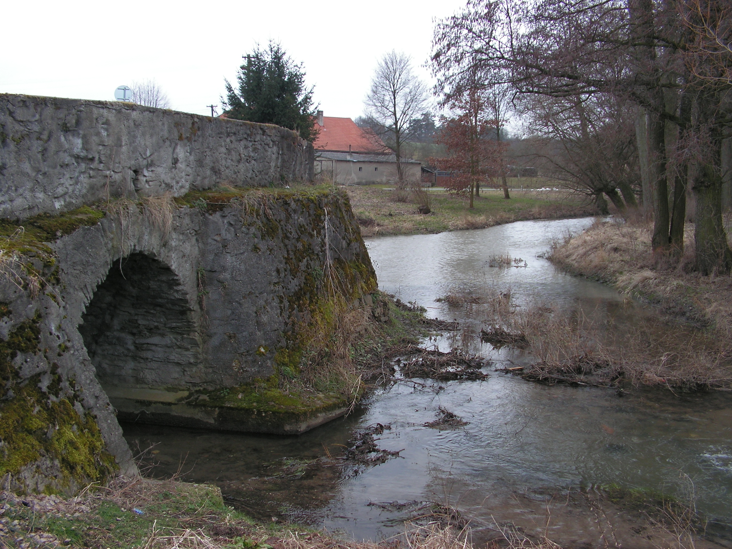 Pohled na starobylý most v Kamenných Mostech a na ústí Zehubského potoka do říčky Hostačovky